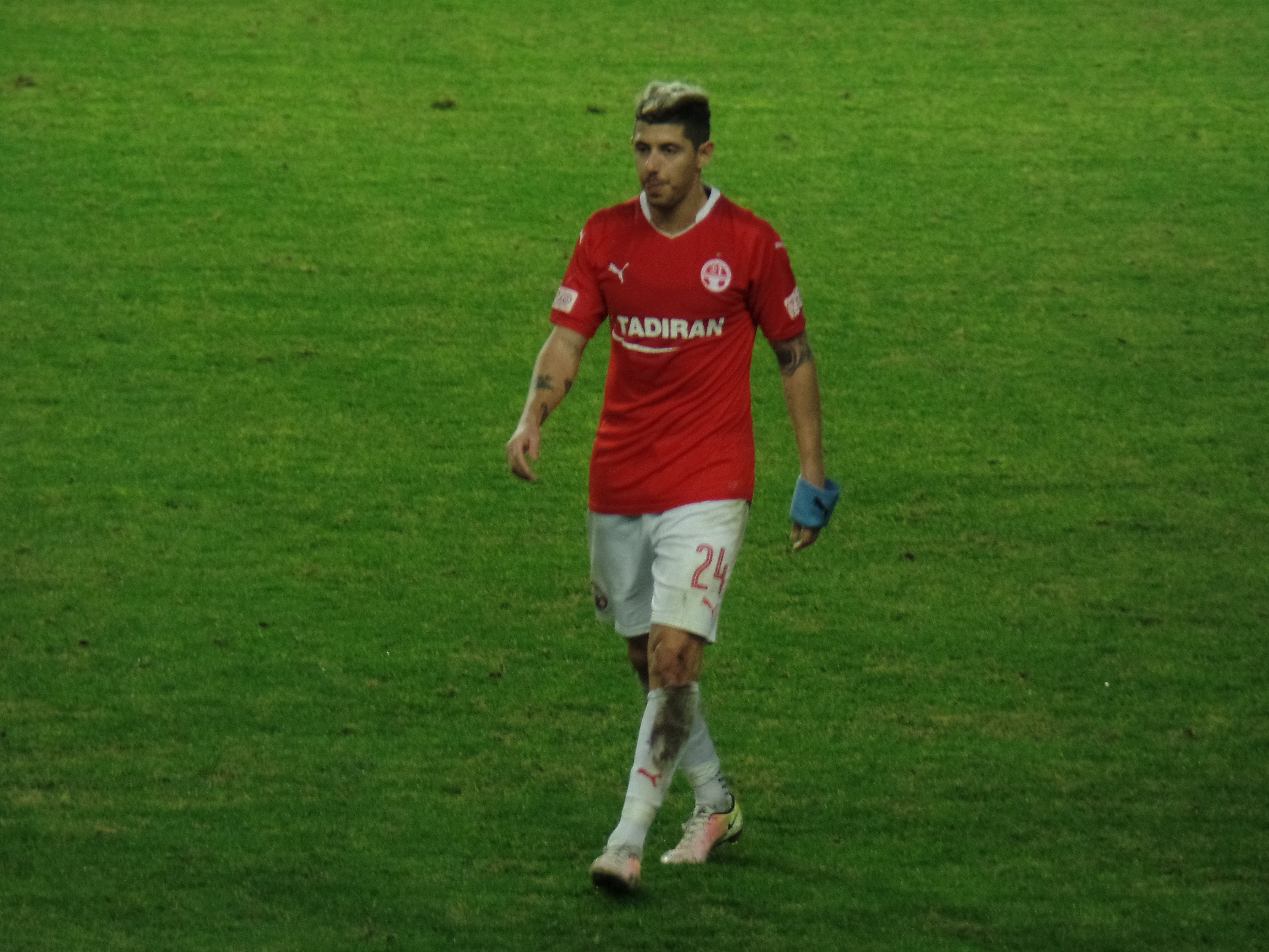 מאור מליקסון במדי הפועל באר-שבע 2017